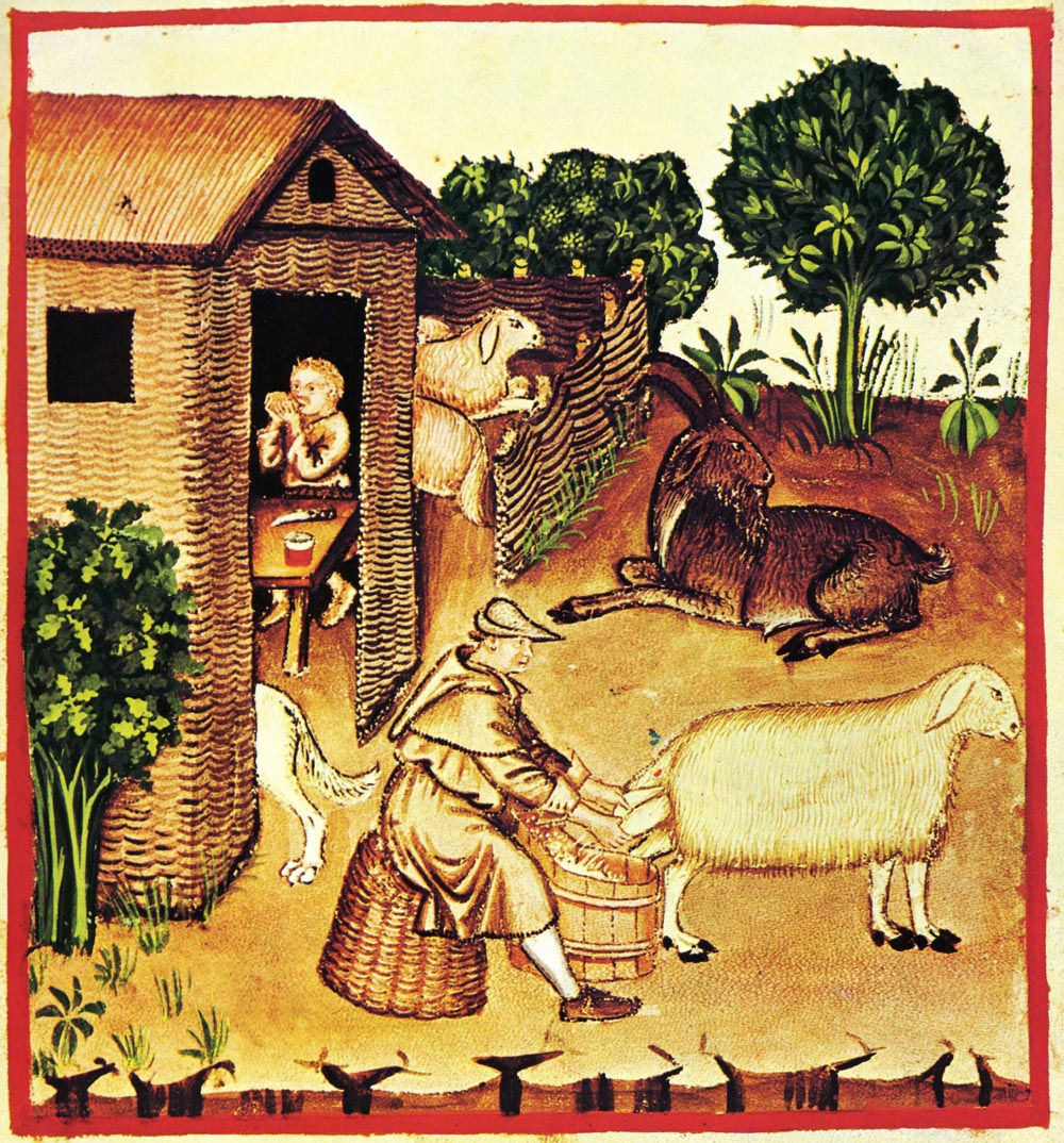 Tacuina sanitatis (XIV century) -alimenti, latte, Taccuino Sanitatis, Casanatense 4182.